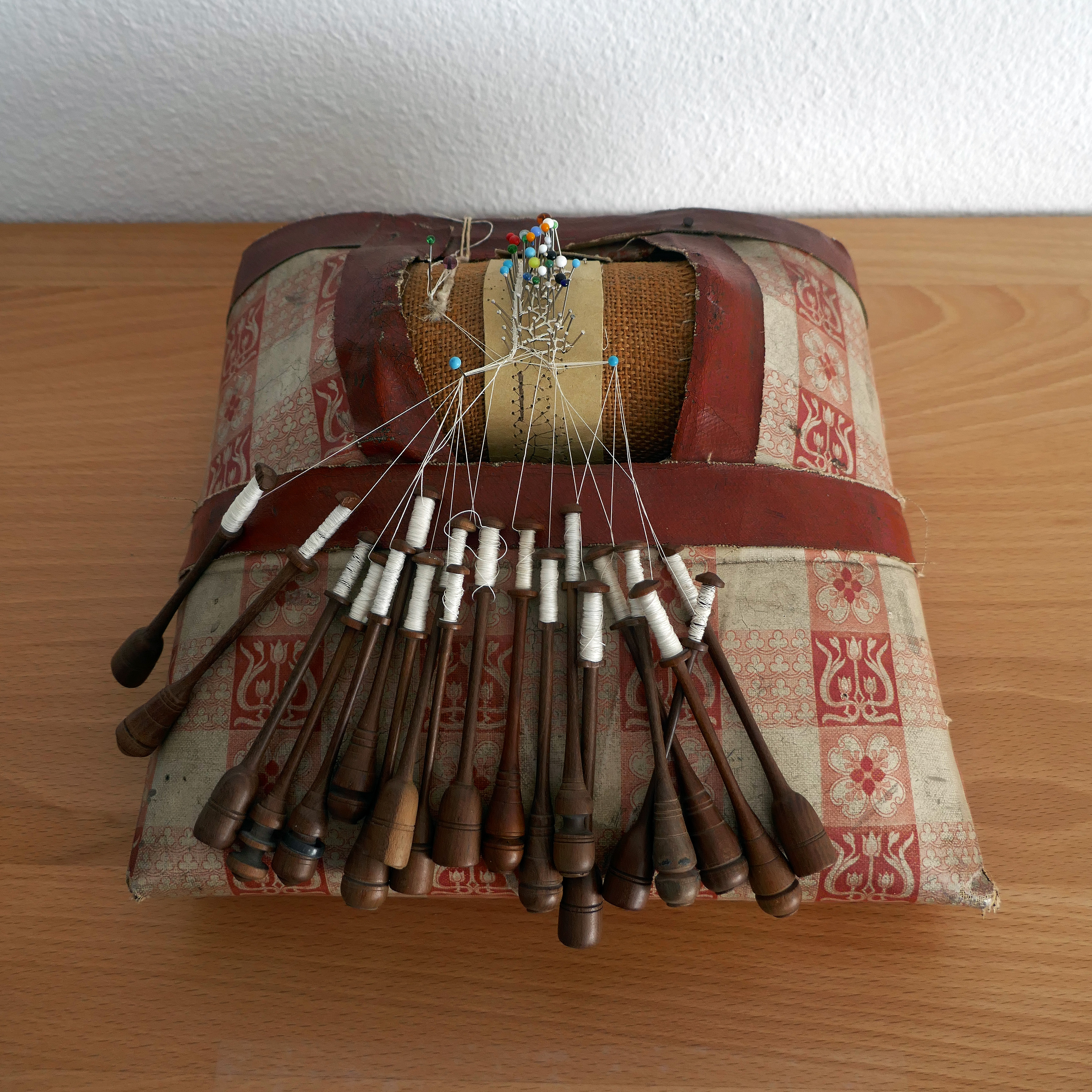 Dentelle aux fuseaux de Mirecourt (Vosges, France) Carreau à rouleau pour la dentelle au mètre Maison de la musique mécanique et de la dentelle à Mirecourt